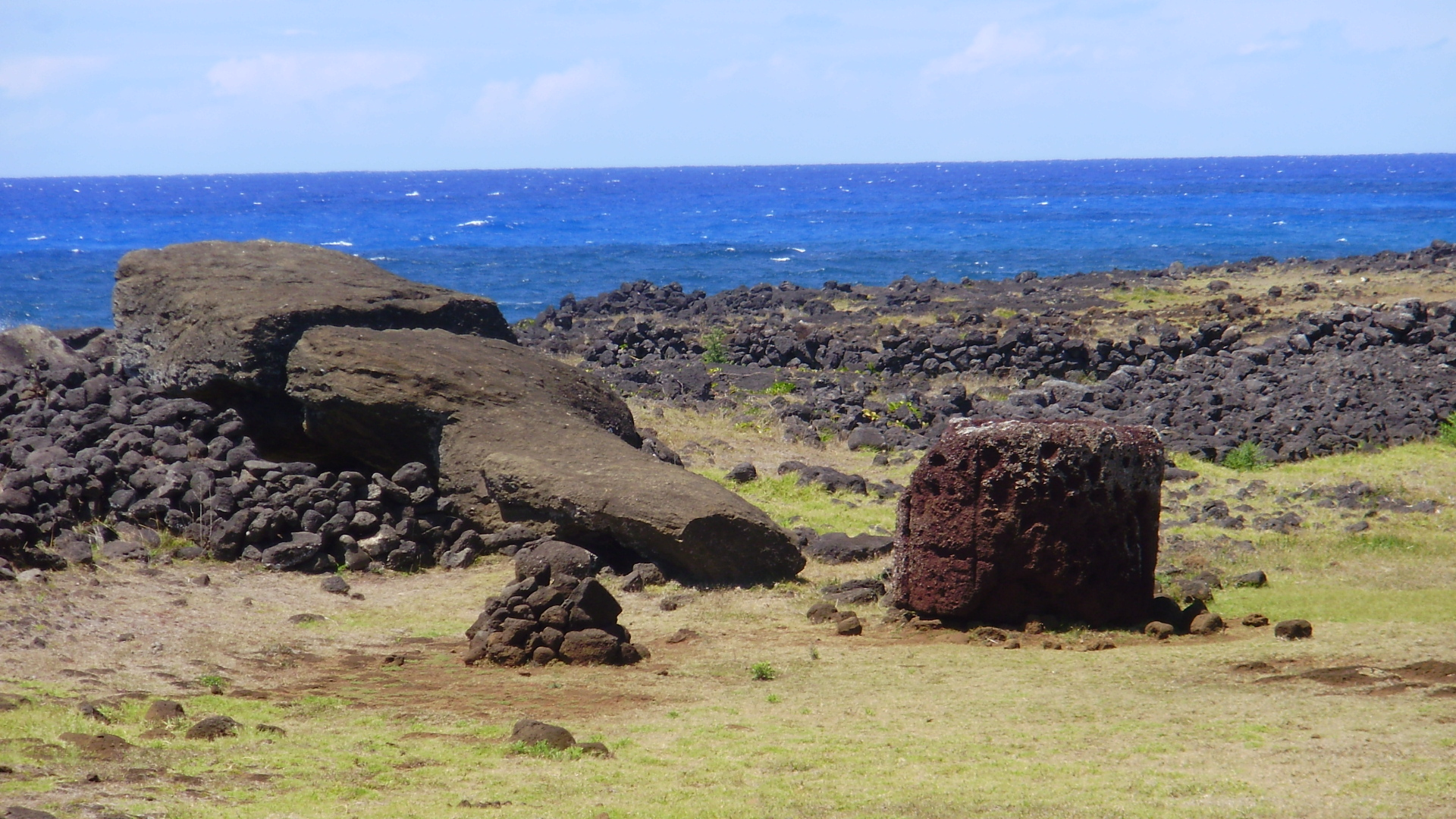 Moái Paro en Ahu Te Pito Kura, isla de Pascua, Chile.